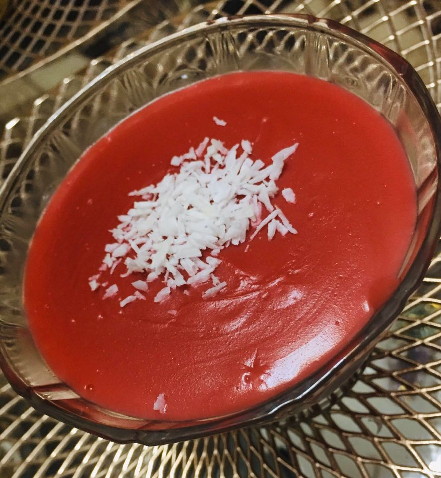 صحن مهلبية مصنوع من الفراولة